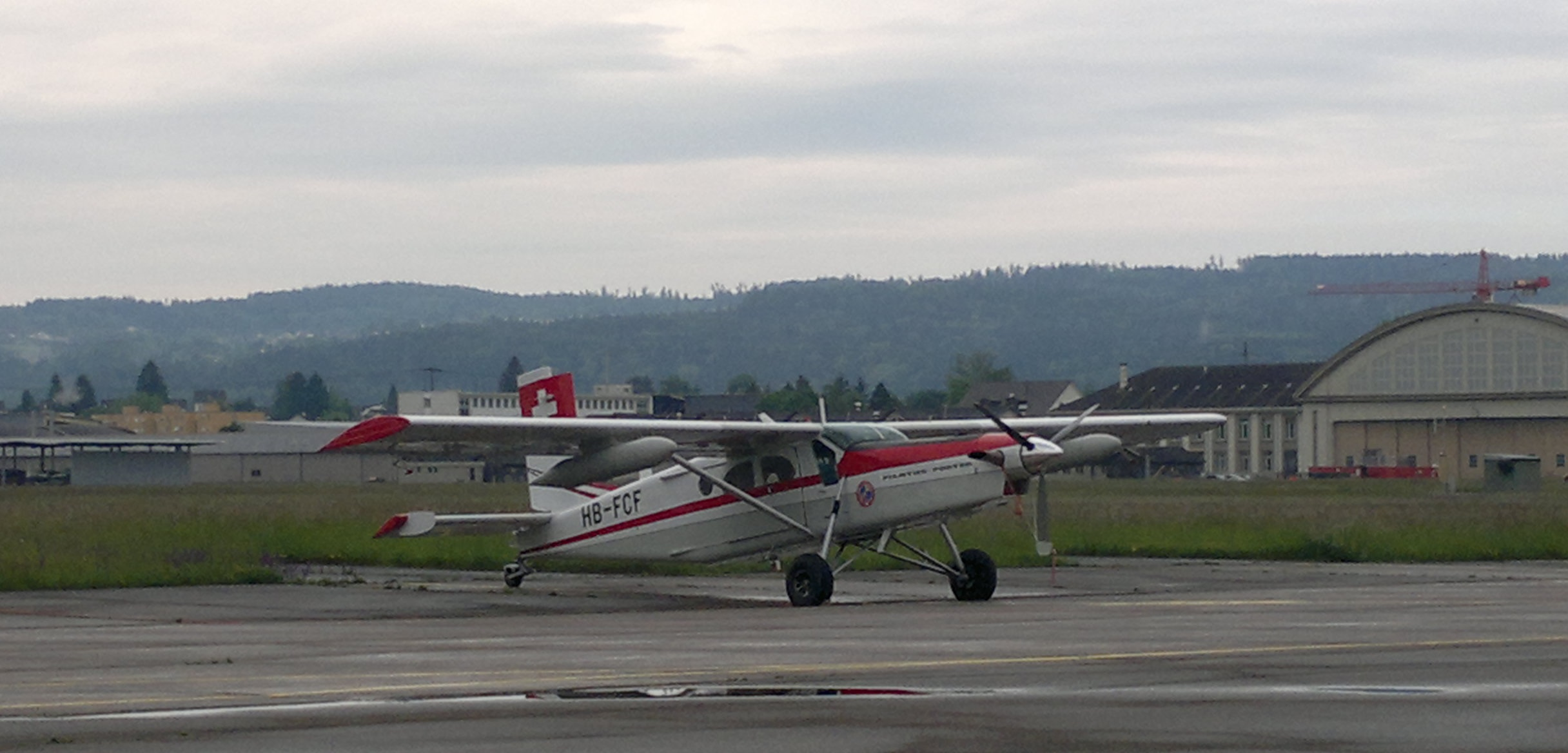 HB-FCF in Dübi